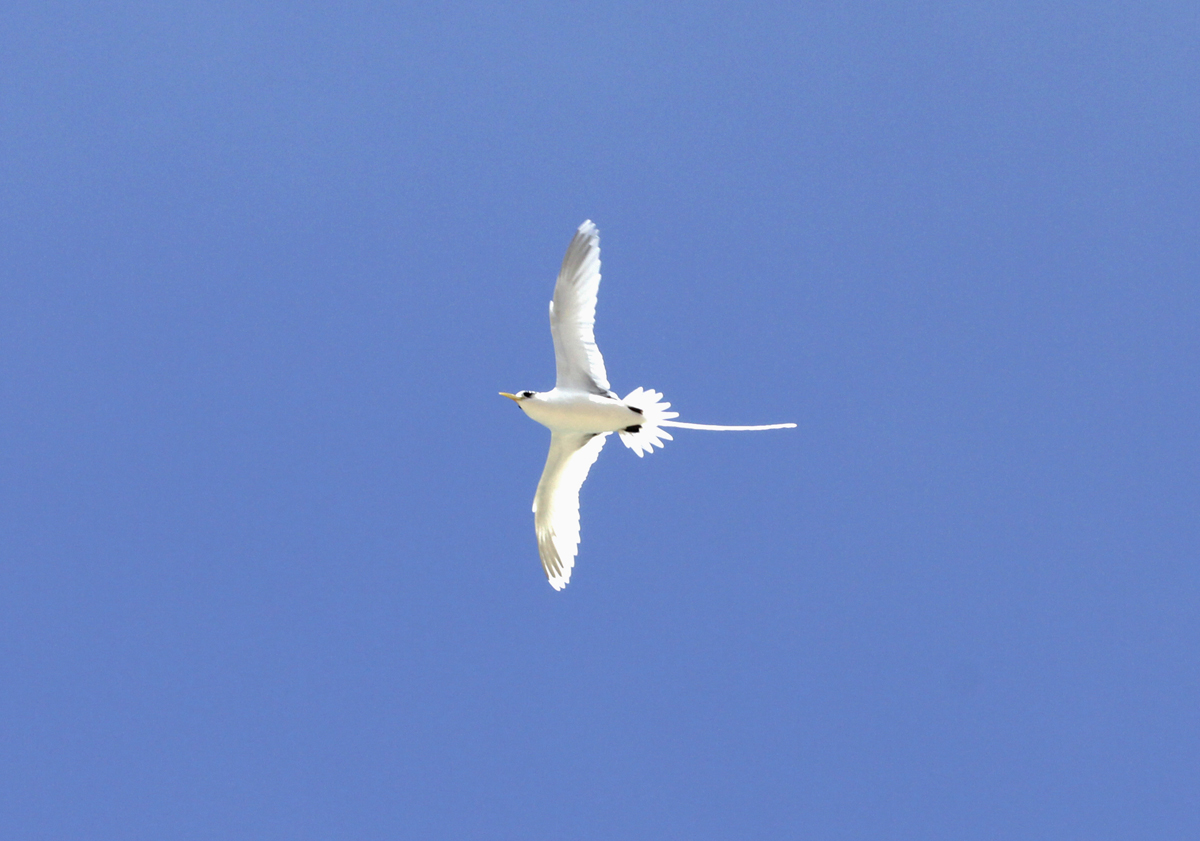 Un Paille en queue à brins blancs (Phaethon lepturus) sur la plage de l'Ermitage, à la Réunion.